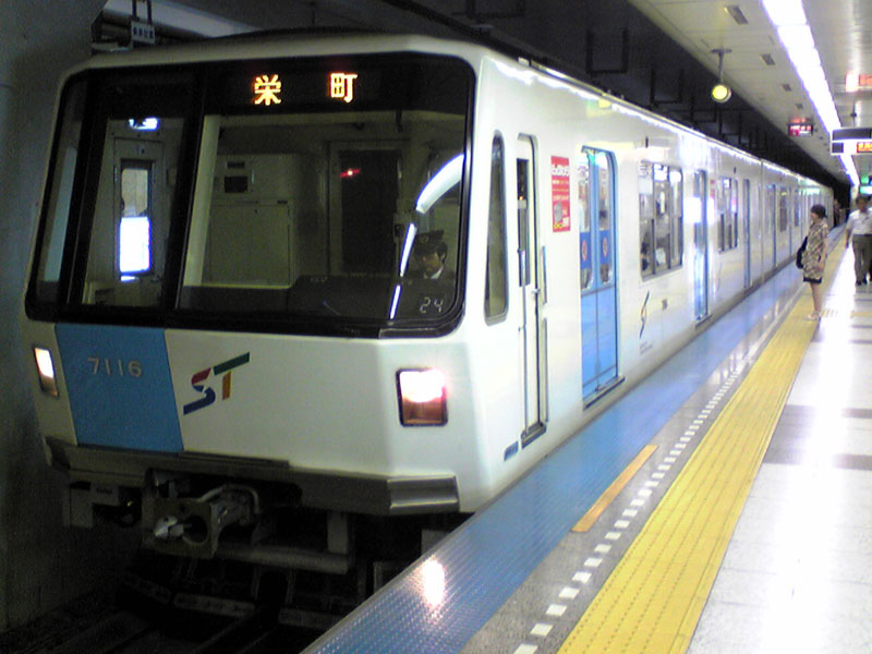 大通駅で撮影した、札幌市営地下鉄東豊線7000形716号車